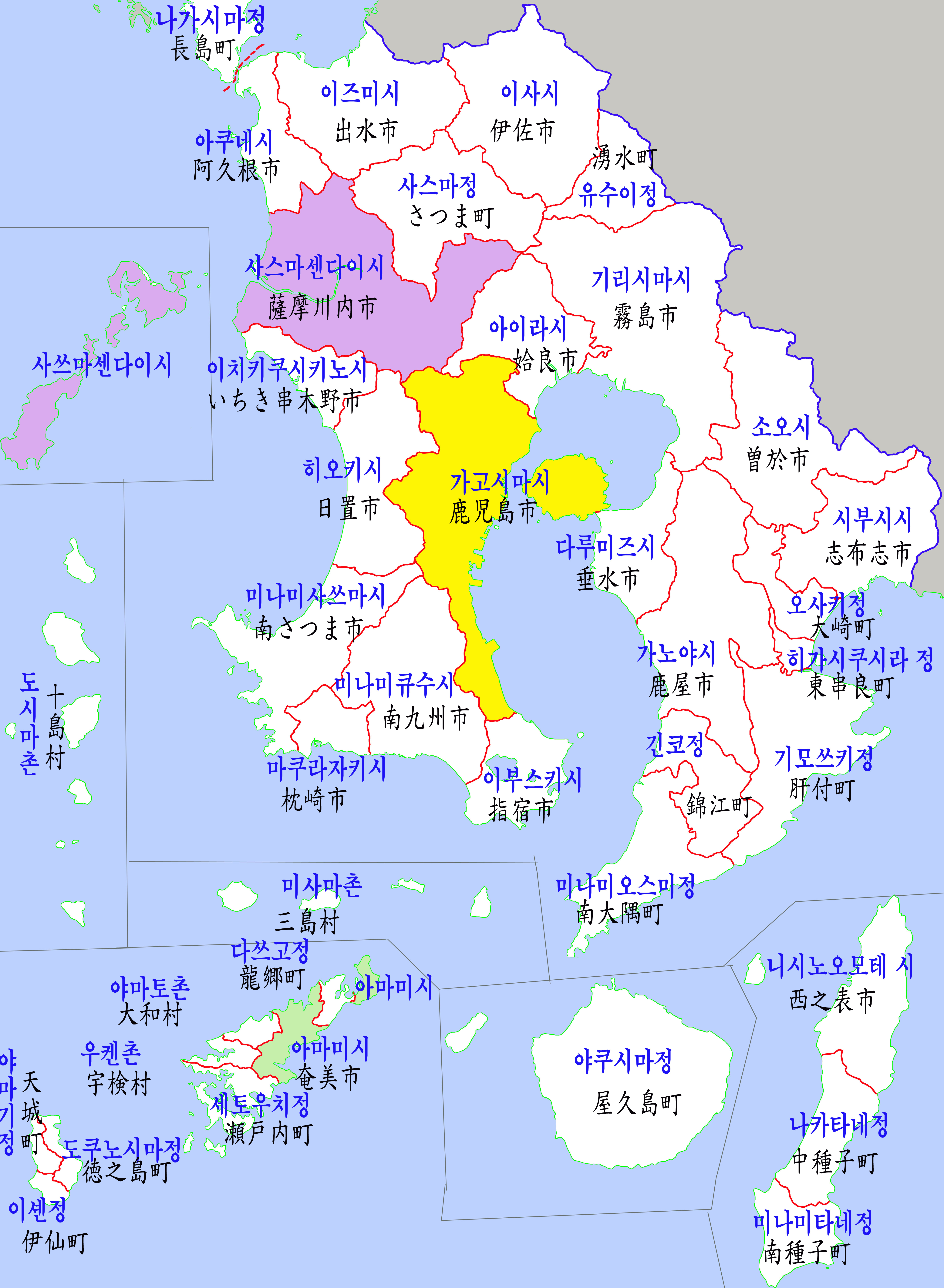 가고시마현 행정구역